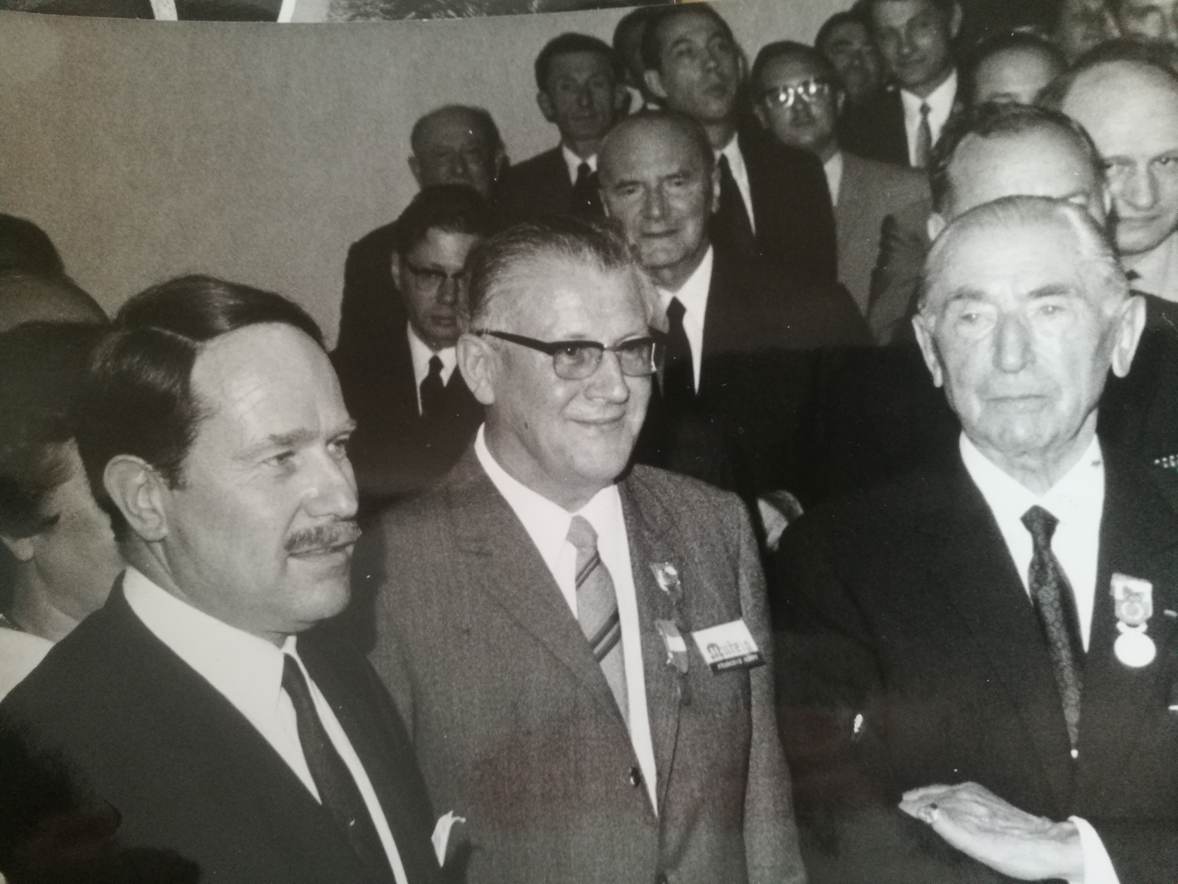 Roland Wagner et son père Jérôme Wagner, anciens PDGs de la brasserie Mutzig